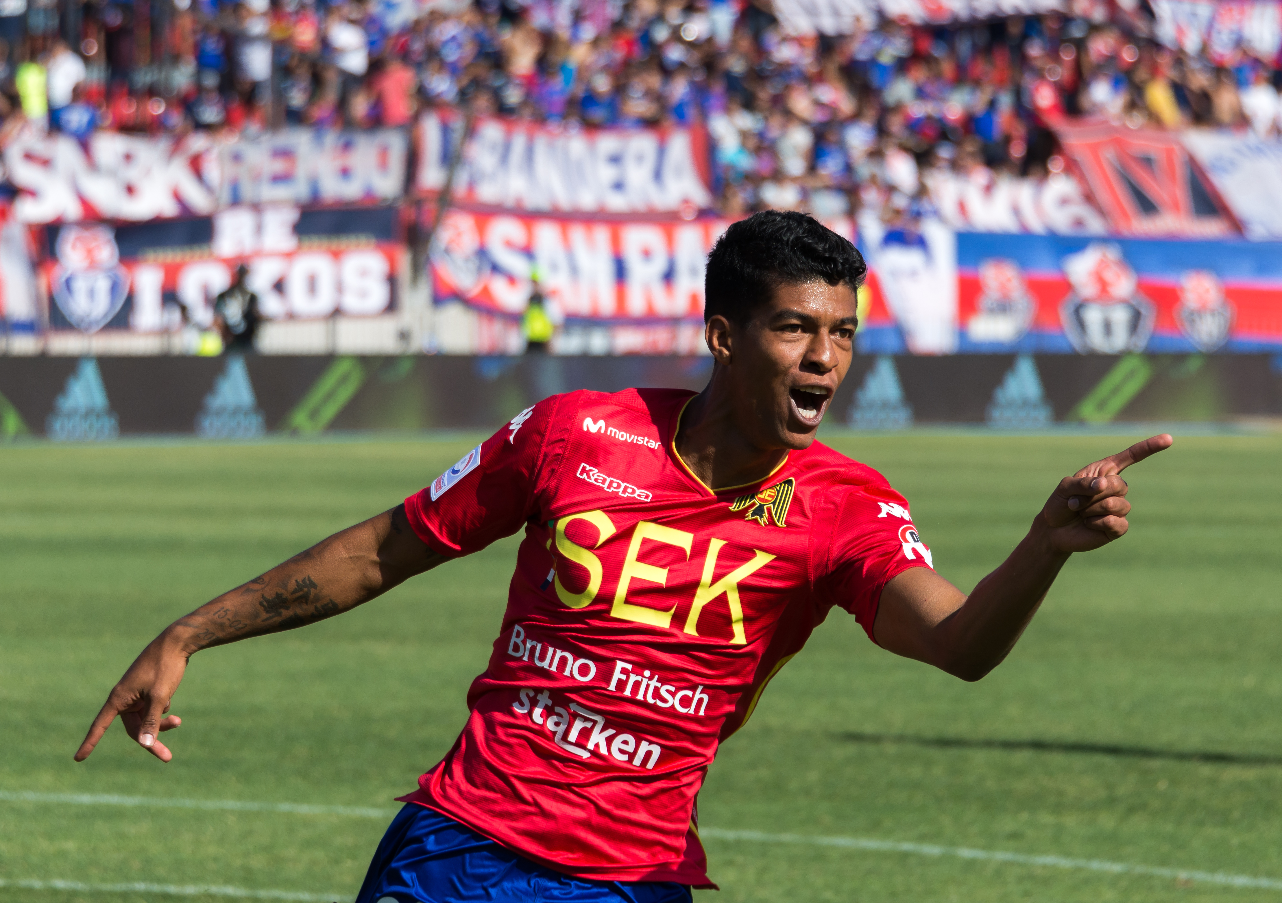 Yulián Mejía, Universidad de Chile v Unión Española, Estadio Nacional Julio Martínez Prádanos, Ñuñoa, Santiago, Región Metropolitana, Chile.